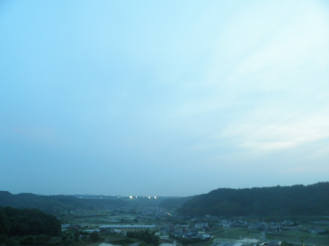 兵庫県三木市志染町戸田